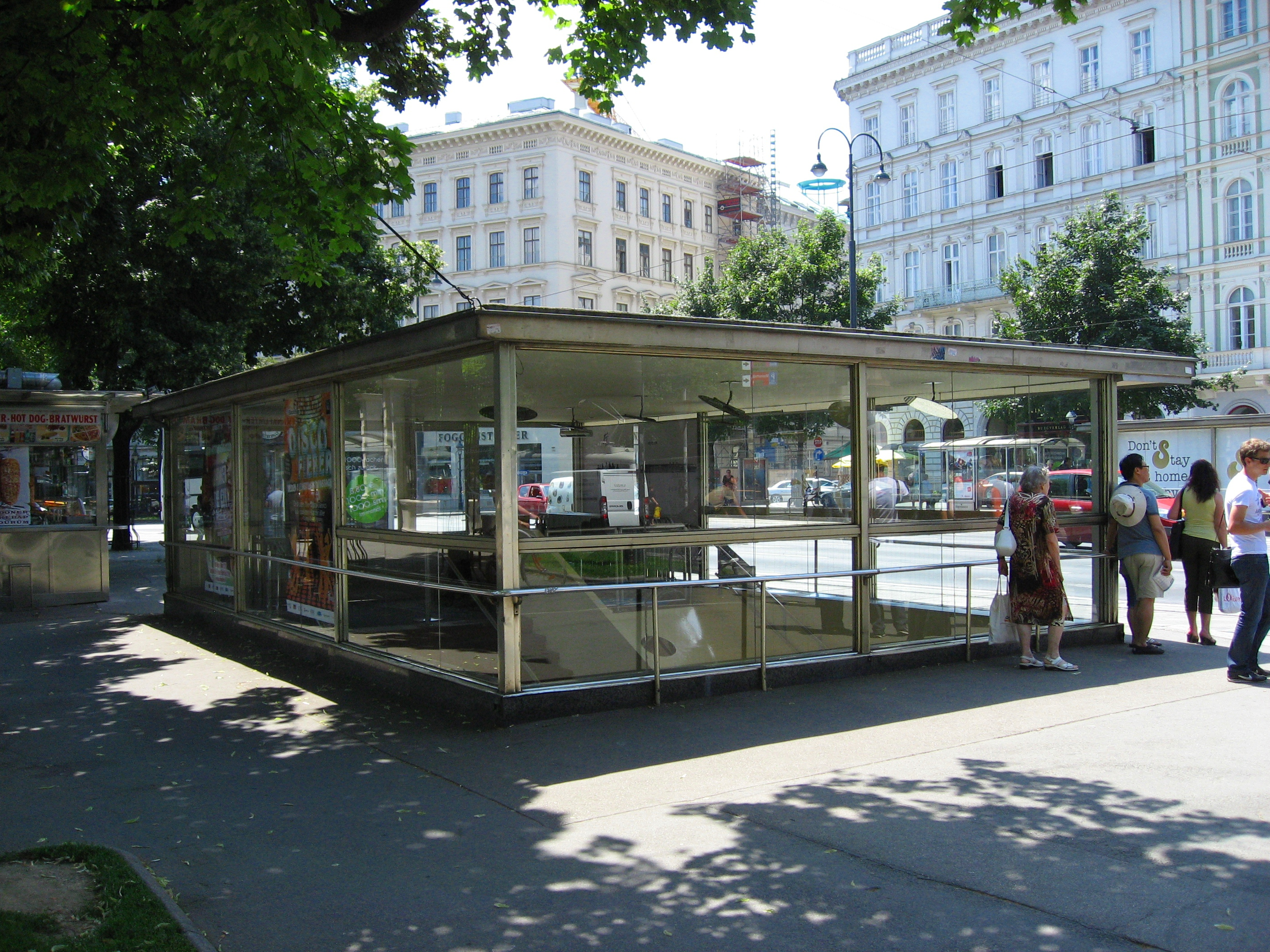 Wien, Abgang zur Babenbergerpassage